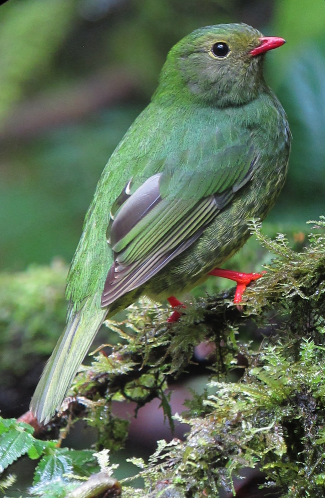 Manizales, Caldas, Colombia